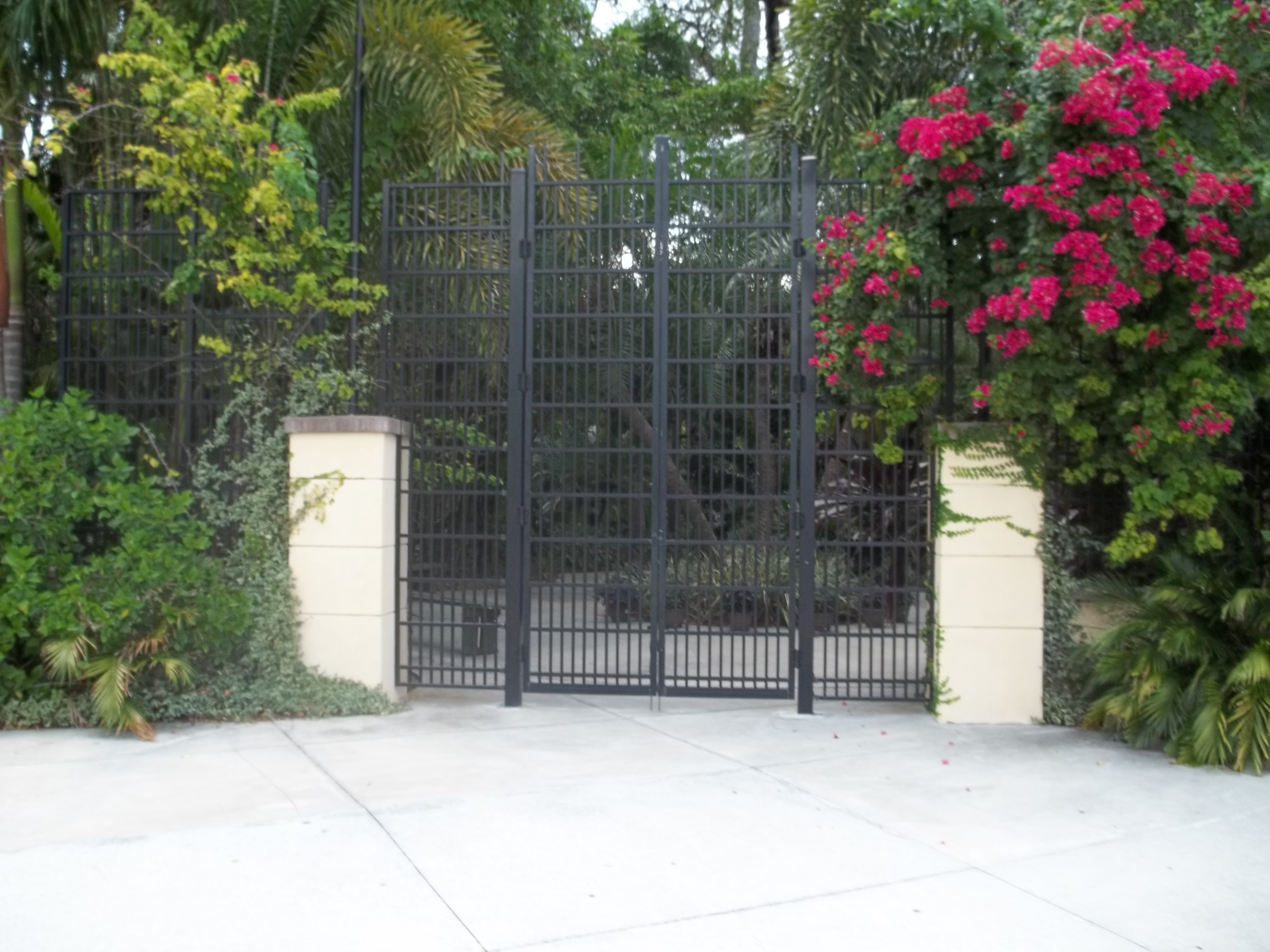 St. Petersburg, Florida: Sunken Gardens (Florida)